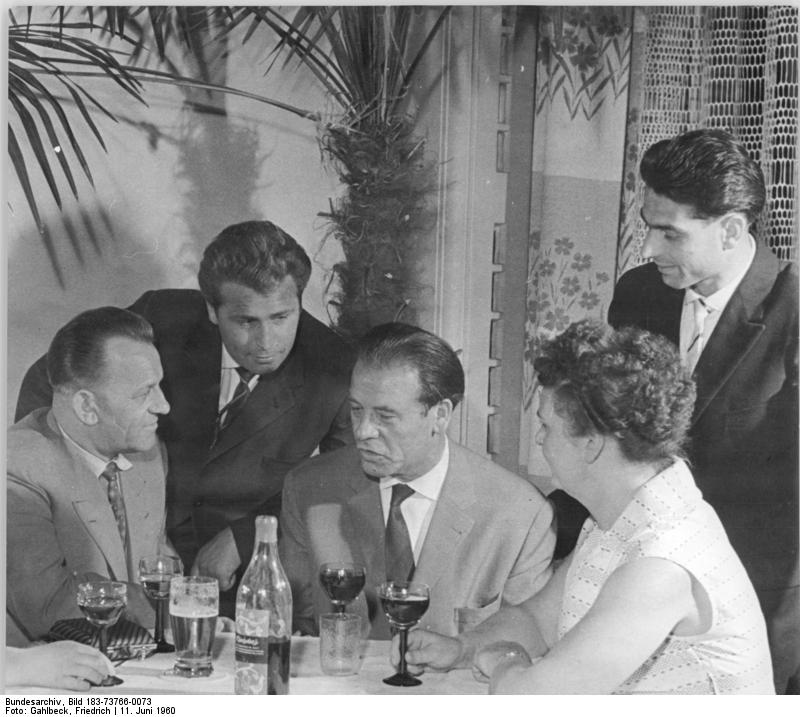 Zentralbild Gahlbeck 13.6.1960 2. Arbeiterfestspiele des FDGB. Filmforum und Filmball zu den Arbeiterfestspielen in Aue. Das Filmforum und der Filmball hatte am 11.6.1960 viele Hundert in das Wismut-Kulturhaus in Aue gelockt. Zahlreiche prominente DEFA-Künstler waren erschienen, unter ihnen Professor Wilkening, Leiter des DEFA-Spielfilmstudios, Raimund Schelcher, Erich Franz, Hans Lucke, Dieter Perlwitz, Willi Schrade und Erich Veldre sowie Harry Hindemith, Rolf Ludwig und Marianne Wünscher. Stürmisch begrüßt wurde der berühmte sowjetische Regisseur Sergei Jutkewitsch. UBz: Nach dem Filmforum fand ein großer Filmball statt. Hier unterhalten sich Wismut-Kumpel mit Harry Hindemith und Horst Schön.